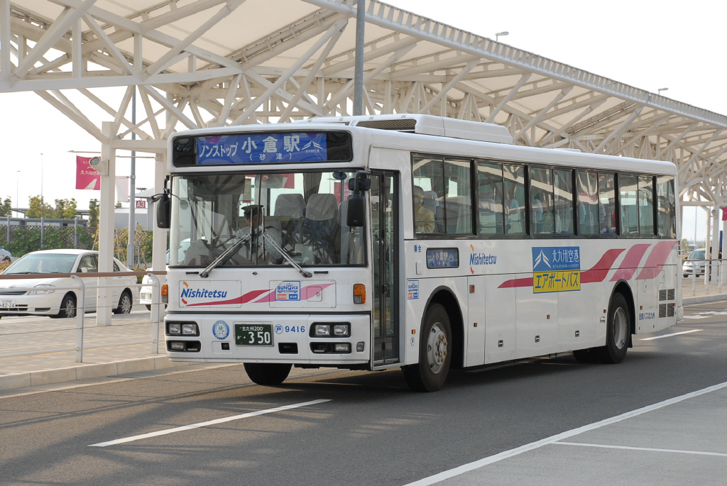 北九州空港にて、2008-5-1撮影